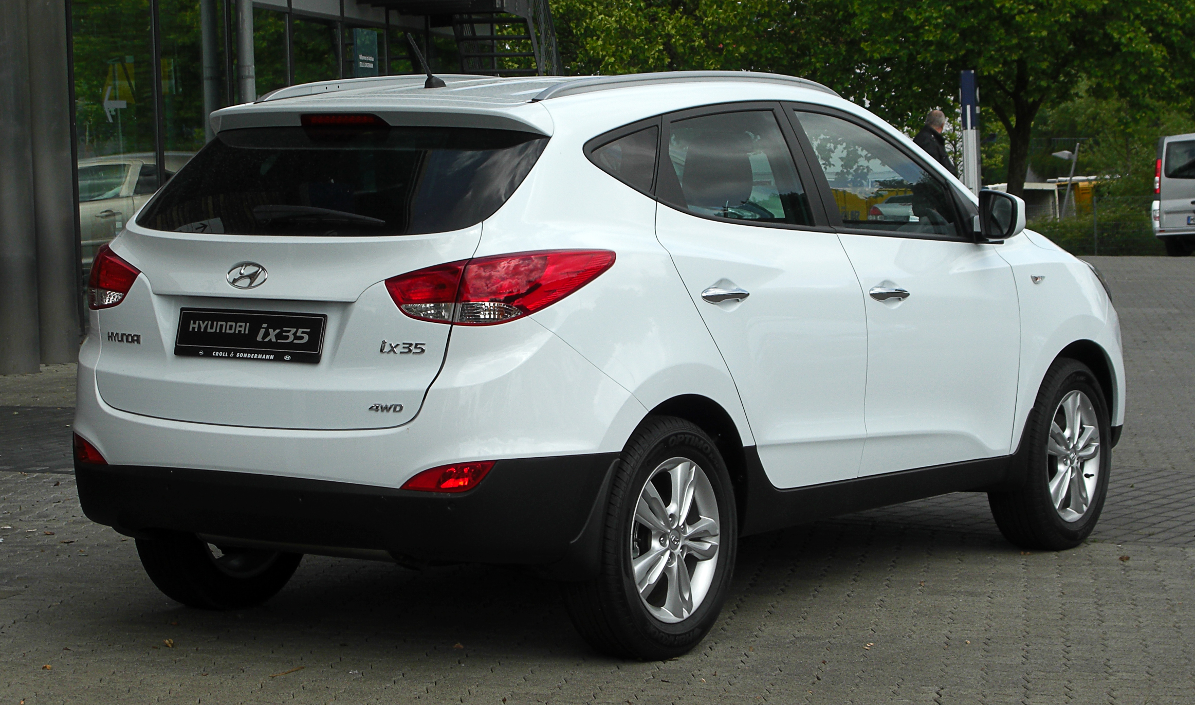 Hyundai ix35 2.0 4WD Premium